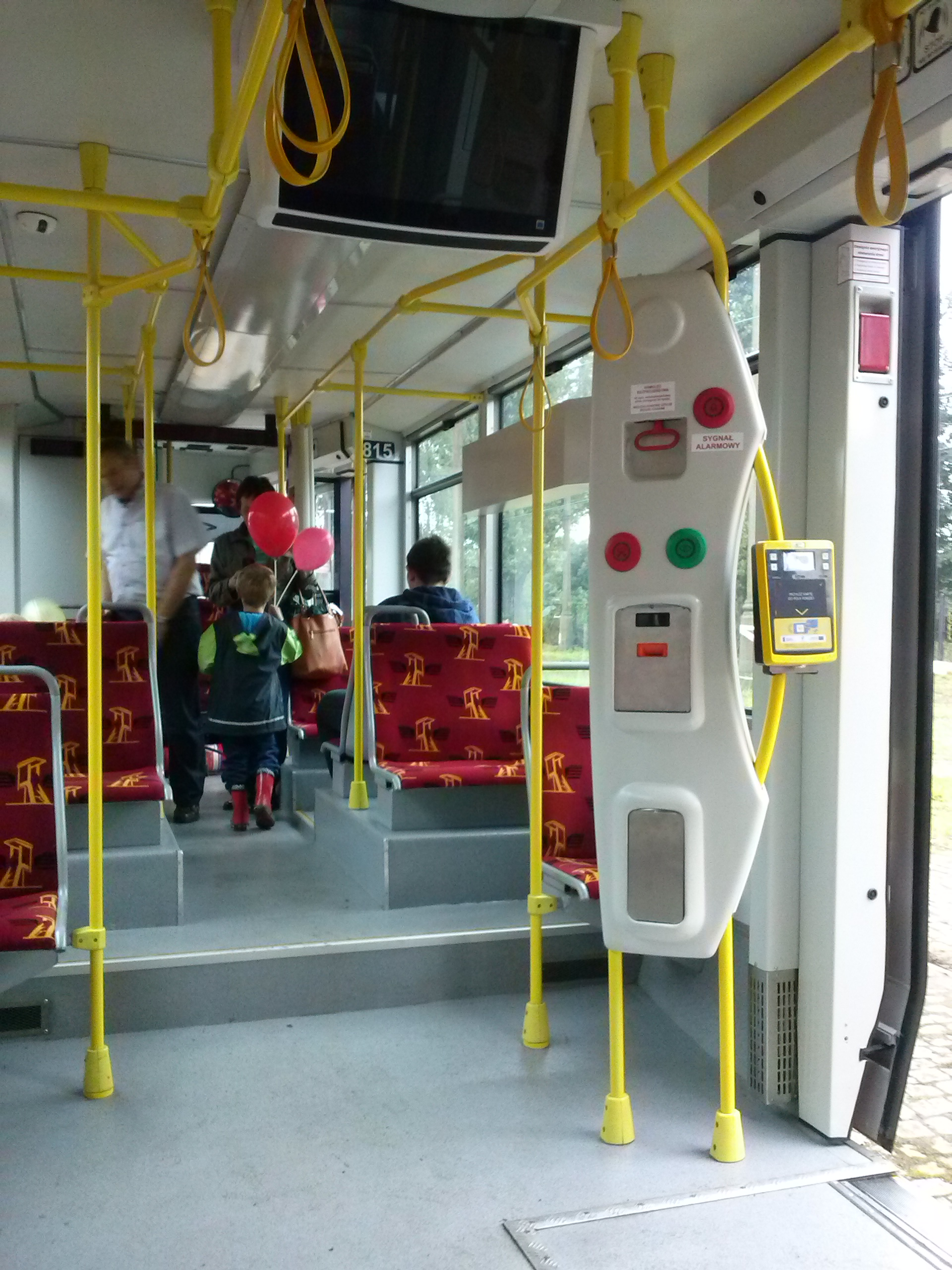 Alstom Citadis 100 - wnętrze po modernizacji (widok w przód)